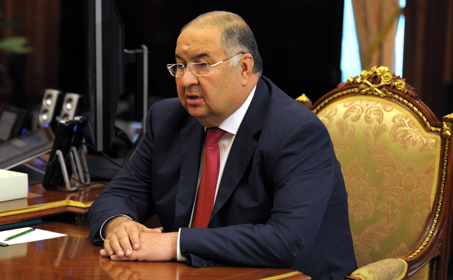 Алишер Усманов во время встречи с Владимиром Путиным